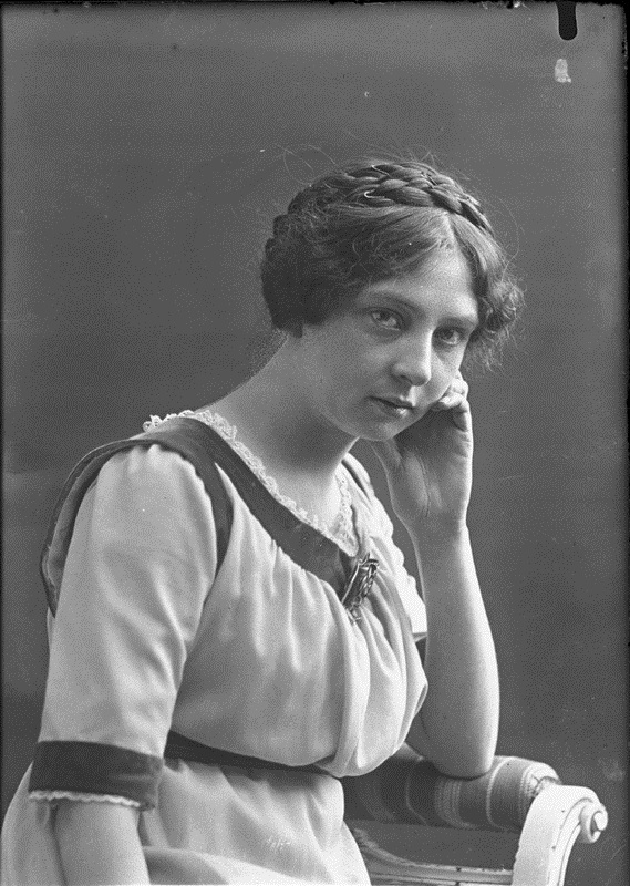 Sigrid Undset, portrett, kvinne, forfatterinne, sittende halvfigur.